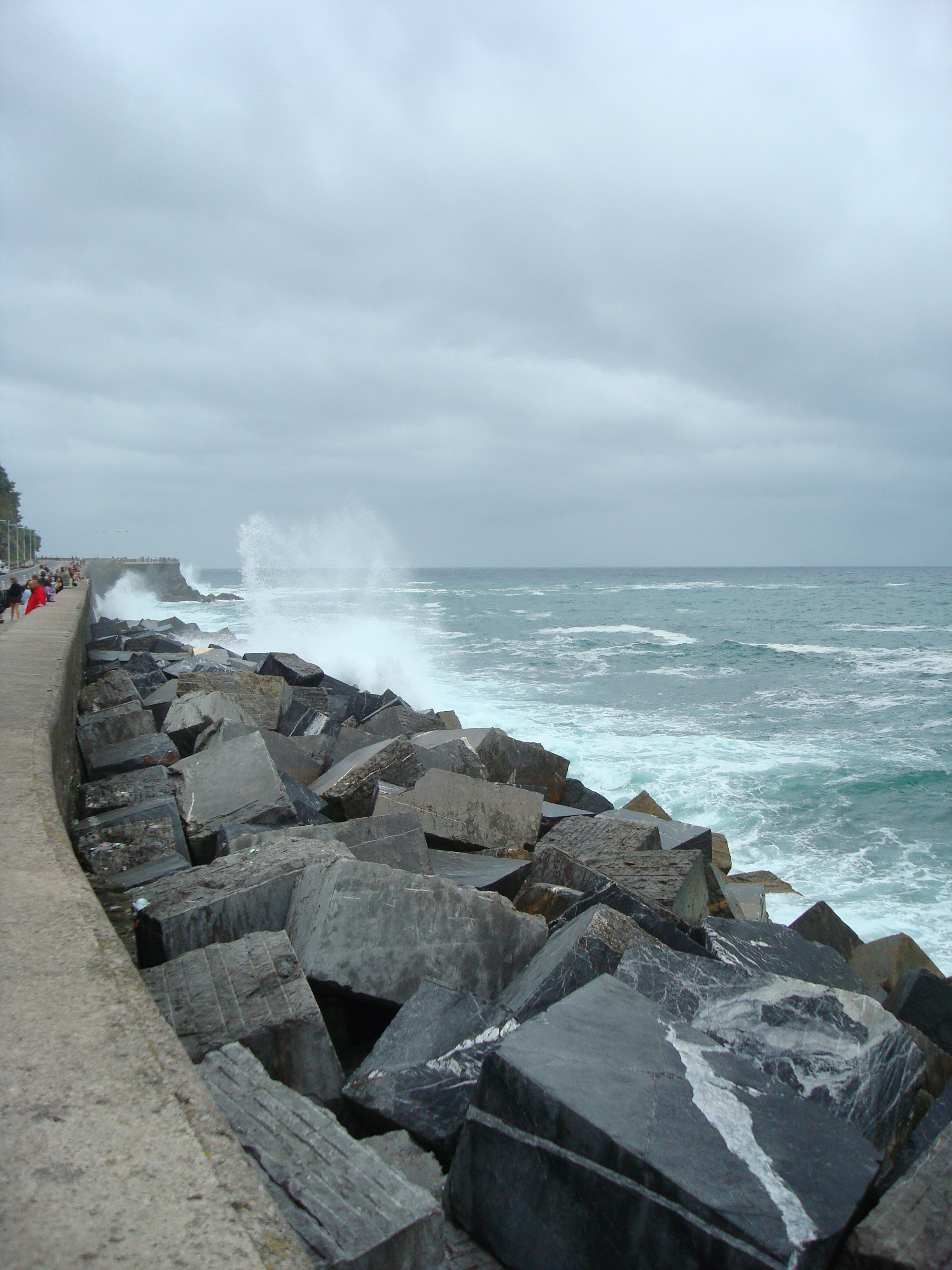 Escullera a la ciutat de Donostia (País Basc) durant un dia ennuvolat